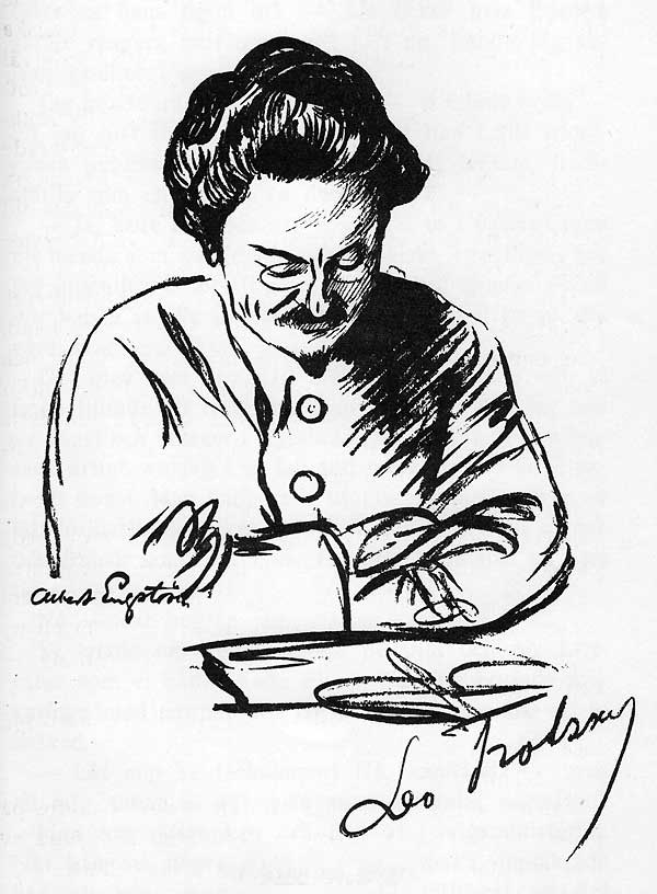 Leon Trotsky, Lev Trotskij, Лев Дави́дович Тро́цкий